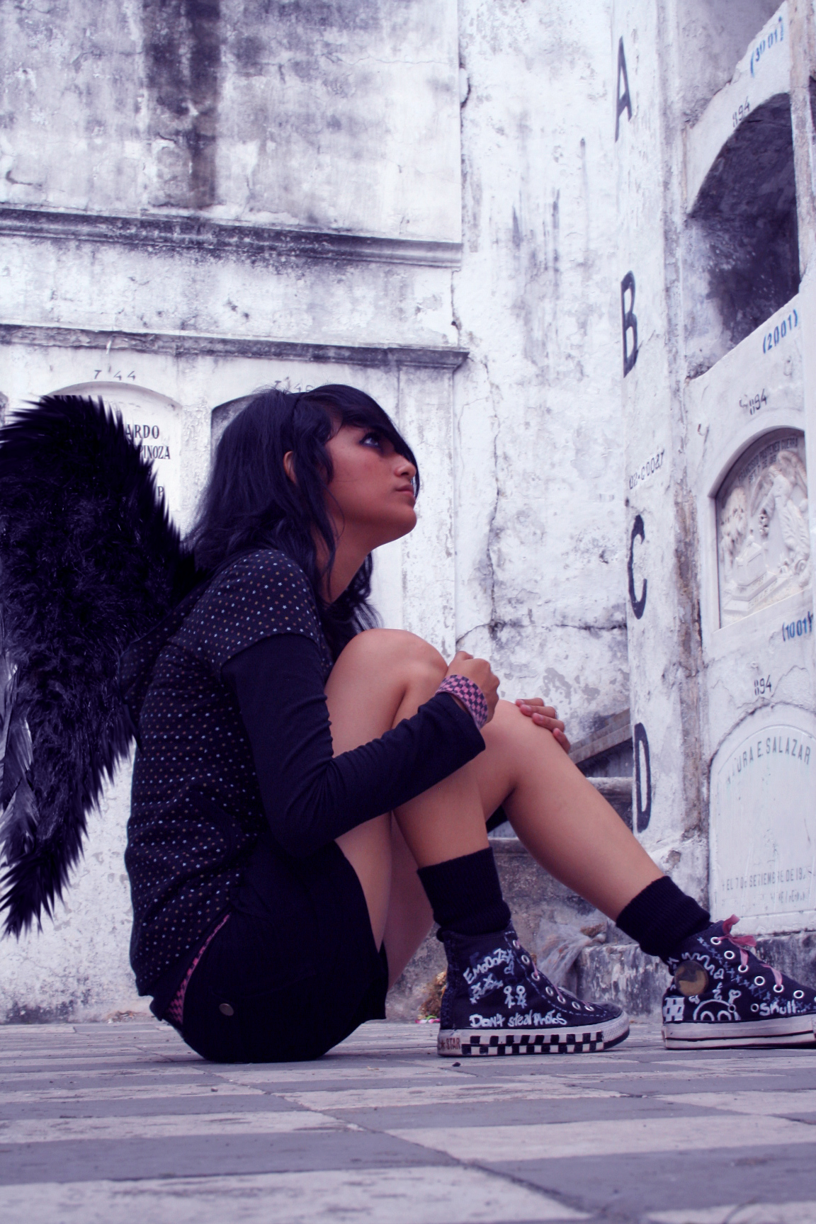 Model: Carmen Oleas Photographer: José Miguel Serrano